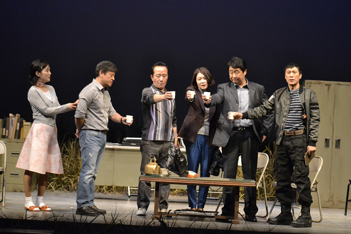 연극 날 보러 와요 20주년 기념공연 프레스콜 현장 (2016.1.27)